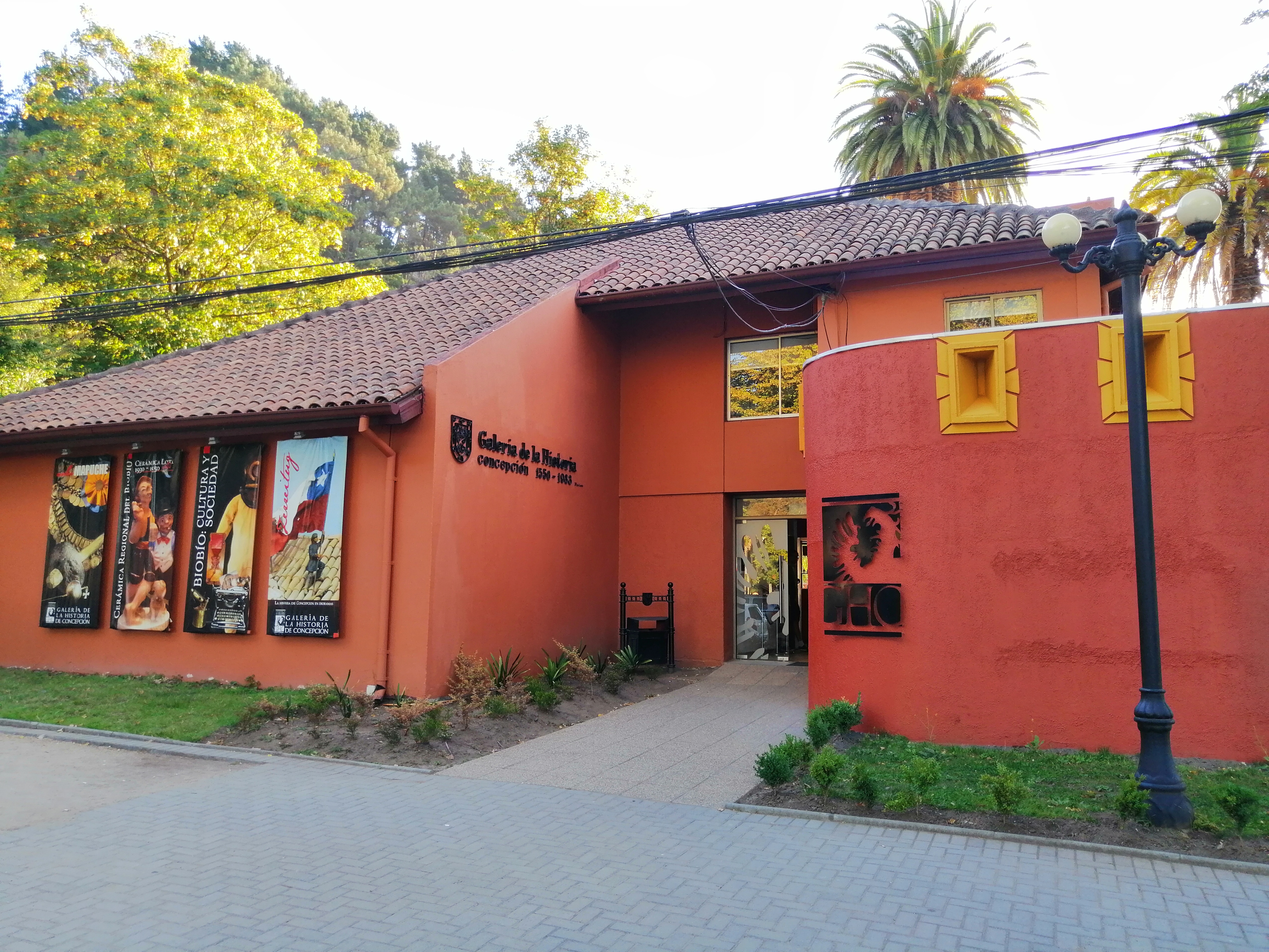 Galería de la Historia de Concepción, museo de historia ubicado en el Parque Ecuador, Concepción, Chile.